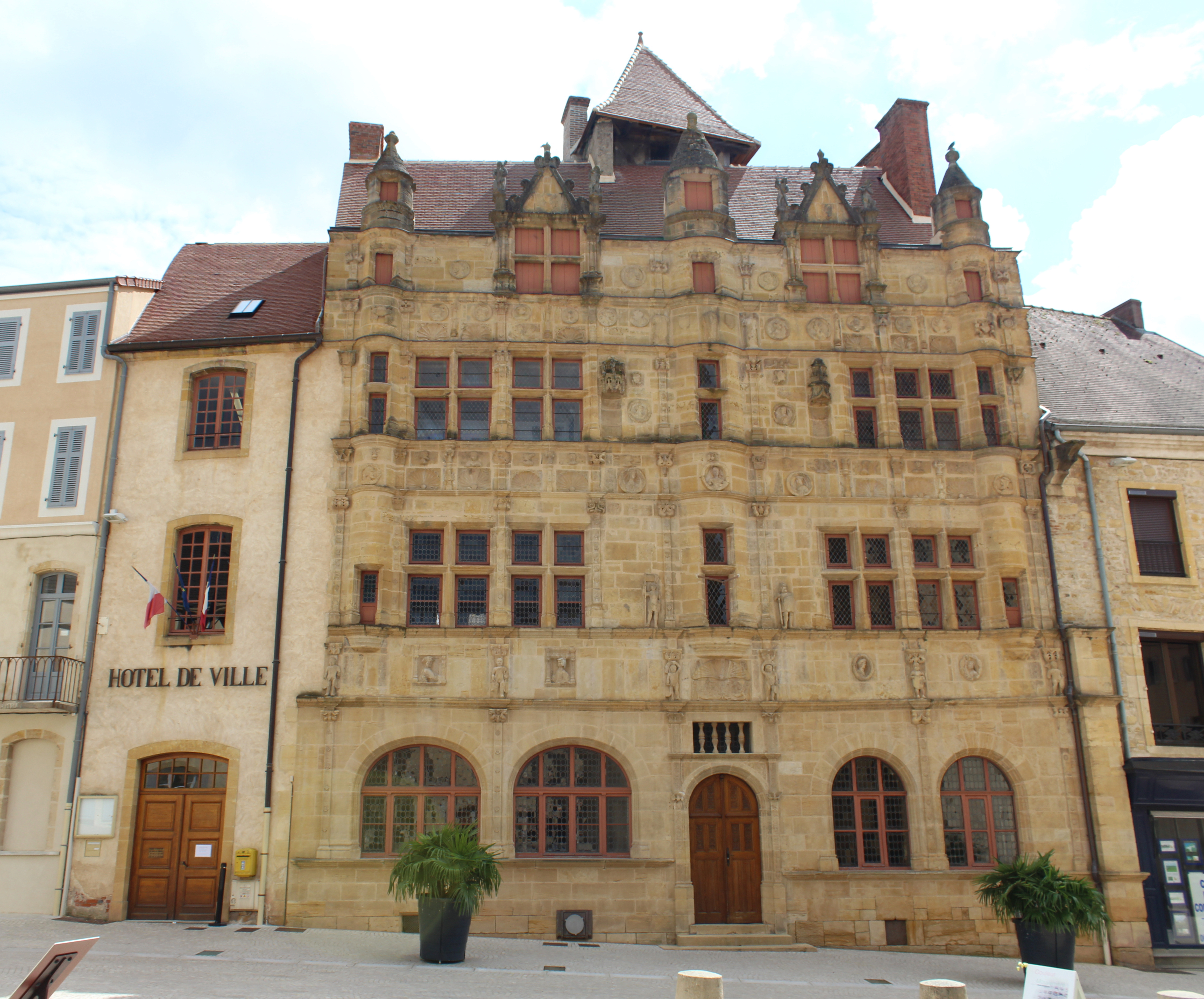 Hôtel de ville de Paray-le-Monial.